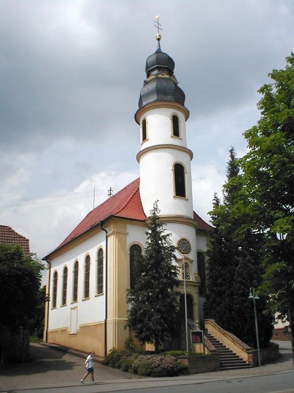 Katholische Filialkirchengemeinde St. Martin in Unterschwarzach (Odenwald) mit außergewöhnlichem Rundturm